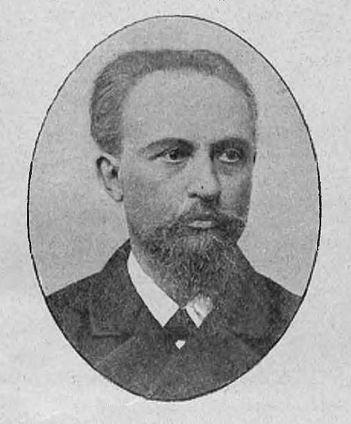 Jan Rotter